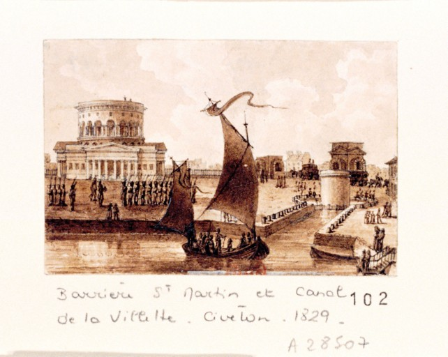 La barrière Saint-Martin (actuelle Rotonde de la Villette) et le canal de la Villette, par Christophe Civeton (1796-1831)